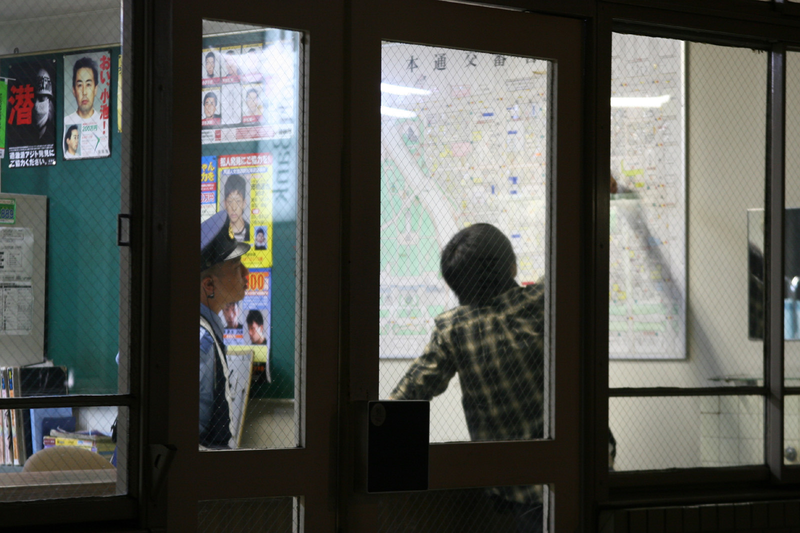 Police station in Hiroshima, in Naka-ku (near Hondori)